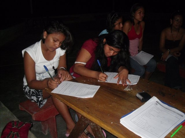 Es nuestro archivo